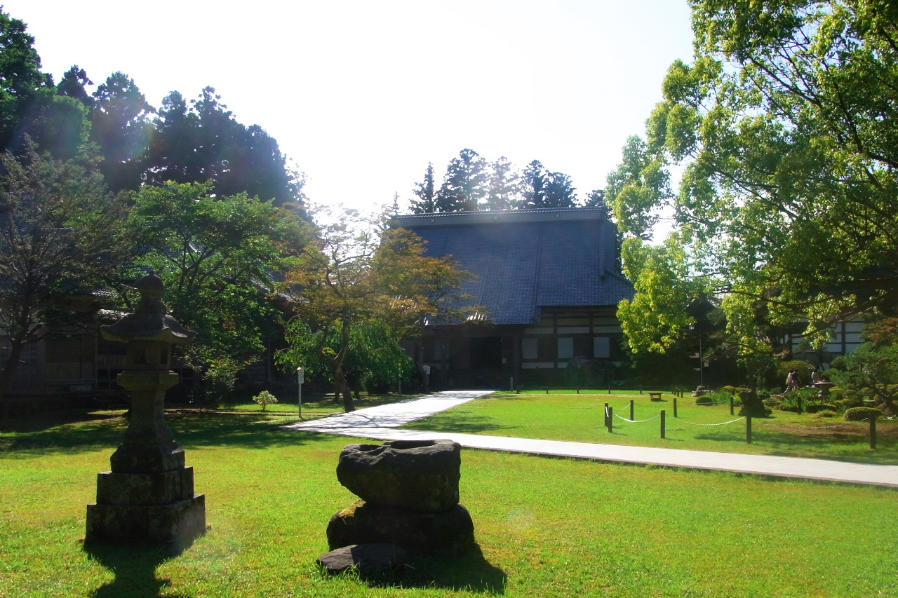 妙宣寺の本堂になります。